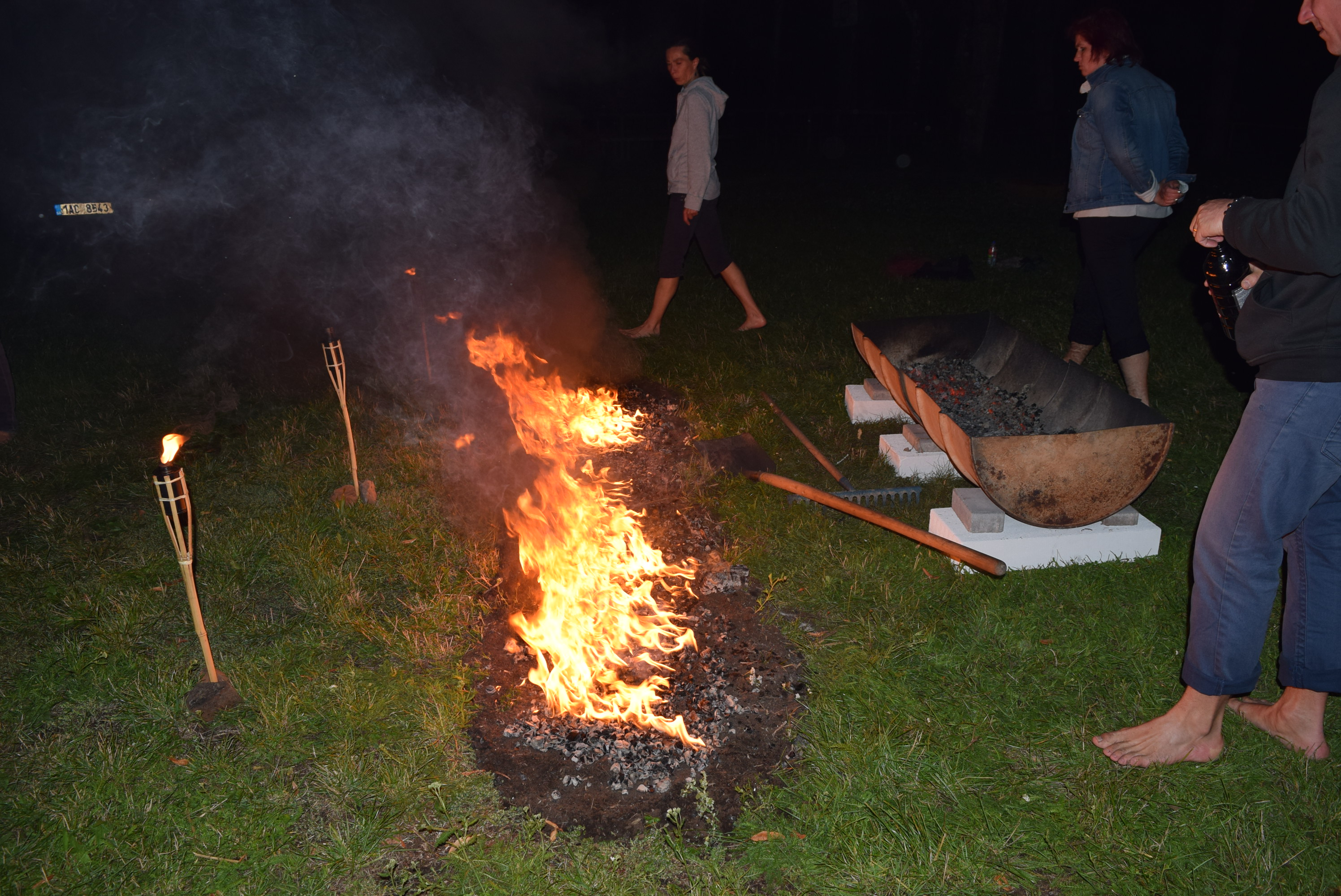 Příprava na rituál chůze po žhavém uhlí. Otevřená mysl